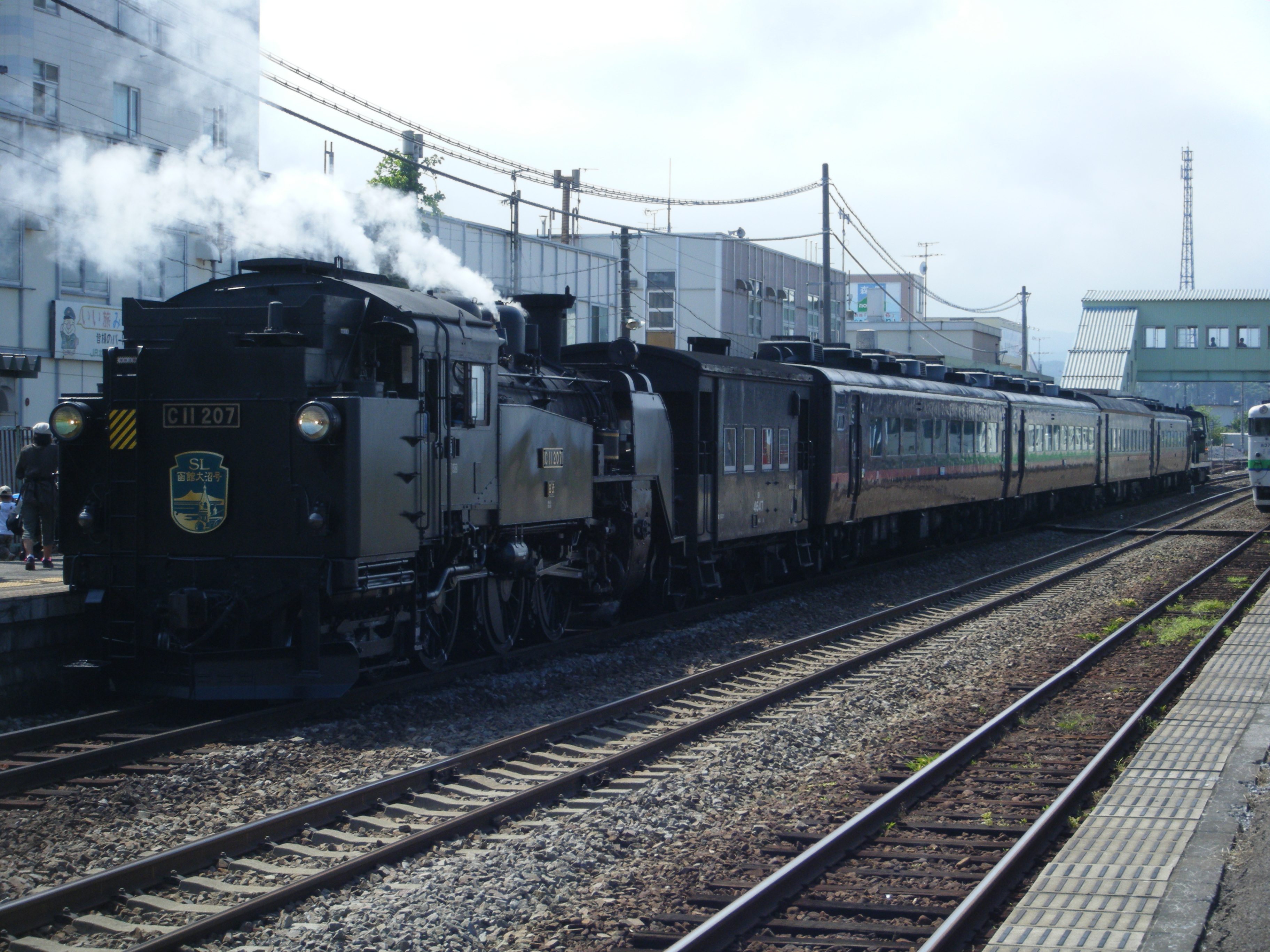 函館行き、発車待ちのSL函館大沼号（JR北海道 函館本線 森駅にて）